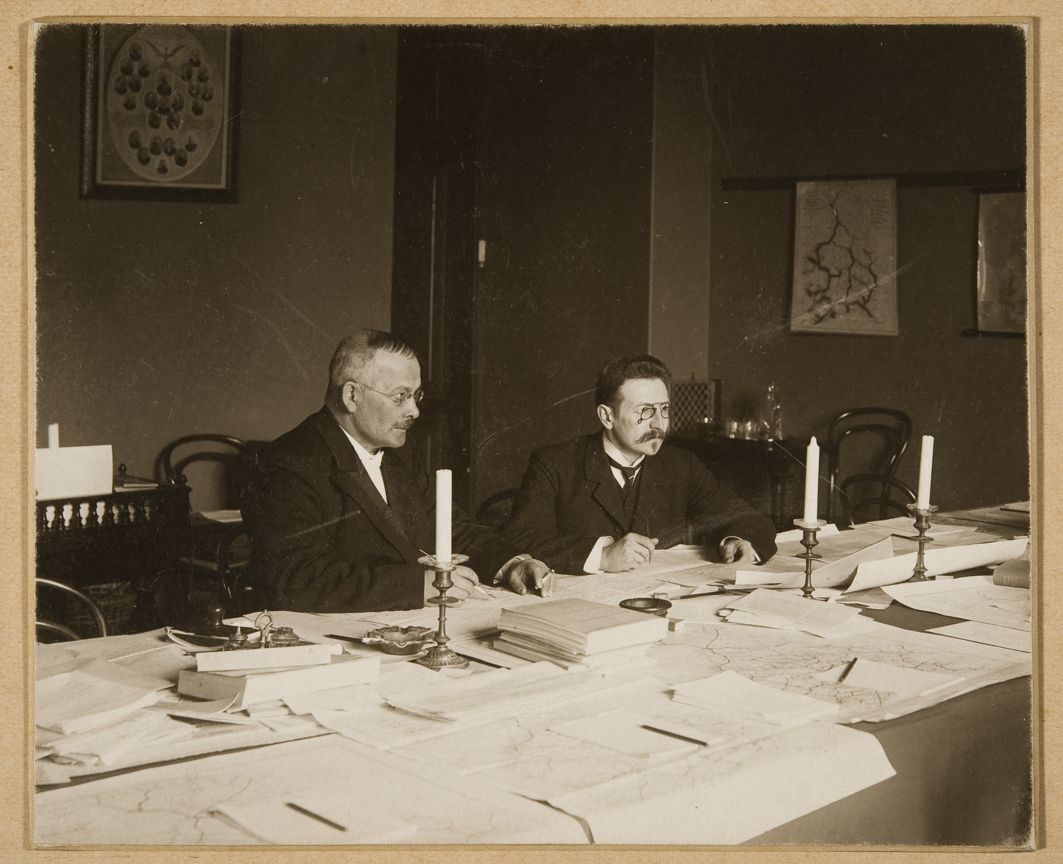 Valtiopäivien 1904–1905 rautatievaliokunnan jäsenet Josef (Juuso) Hedberg (1851–1919) ja Gustaf Johannes Winter (1868–1924).